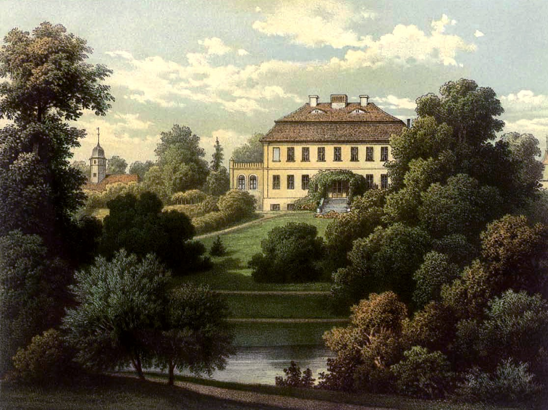 Gut Fredenwalde